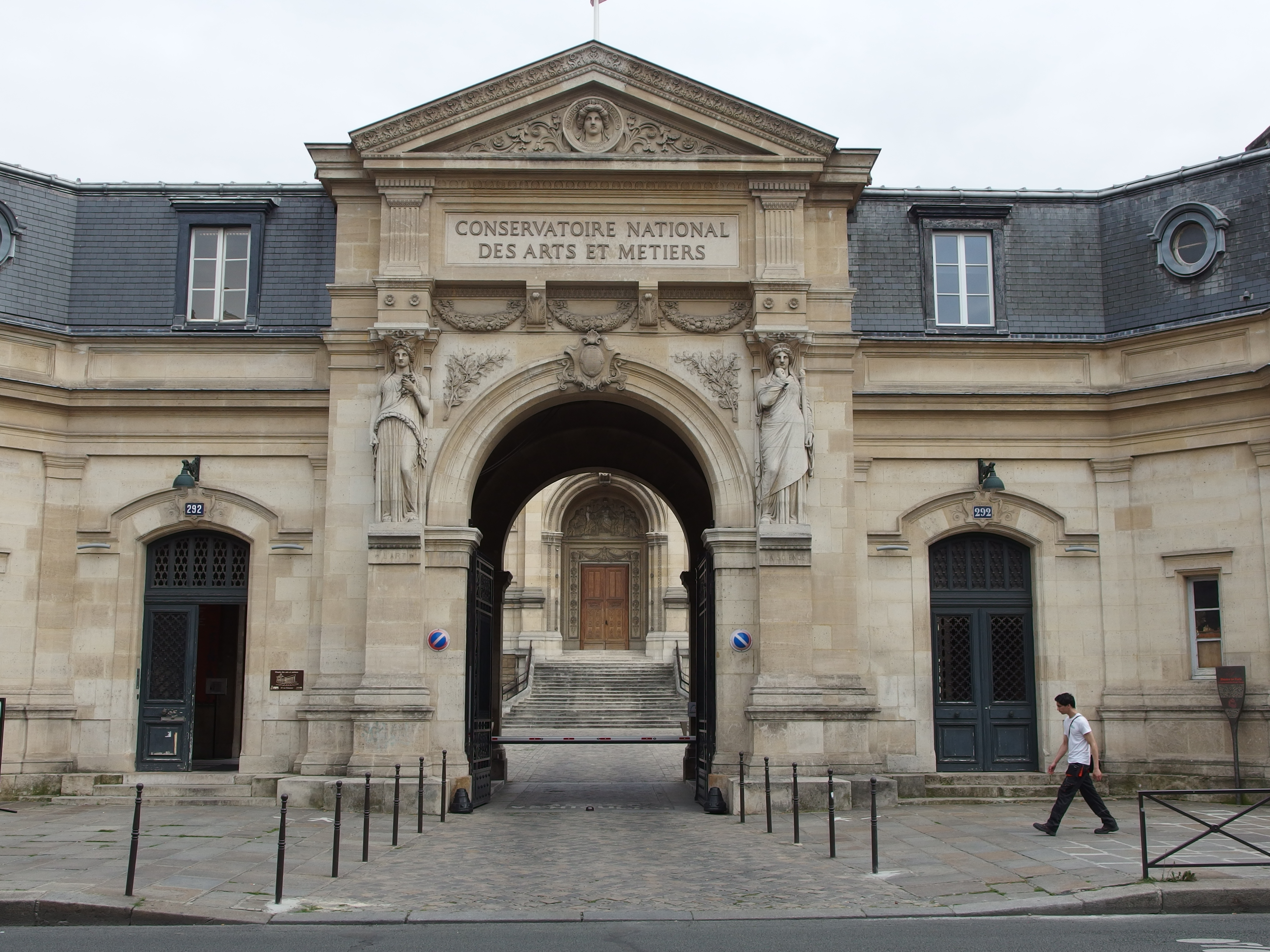 Conservatoir National des Arts et Métiers, Paris.